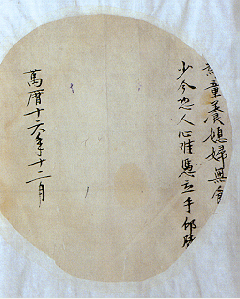 明万历十六年（1588年）十二月所立的童养媳婚书。